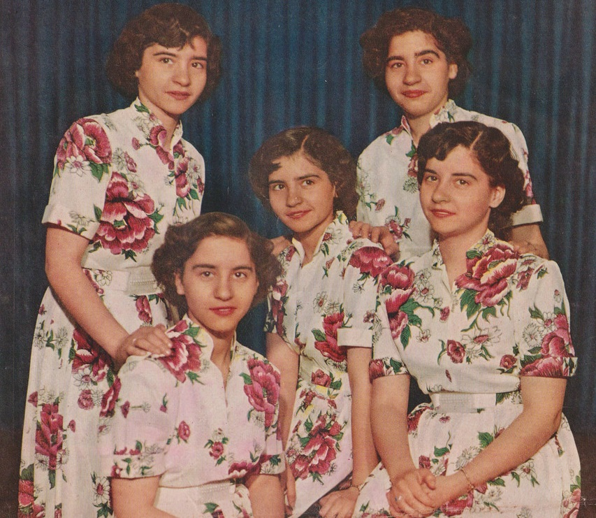 フランスのニュース雑誌「パリ・マッチ」174号（1952年7月14日）の表紙を飾ったディオンヌ5つ子姉妹